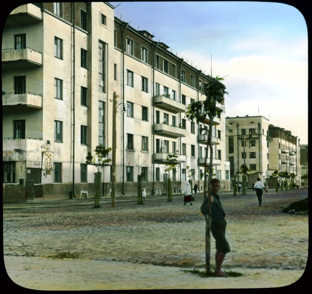 Москва. Усачевка (современная Улица 10-летия Октября)